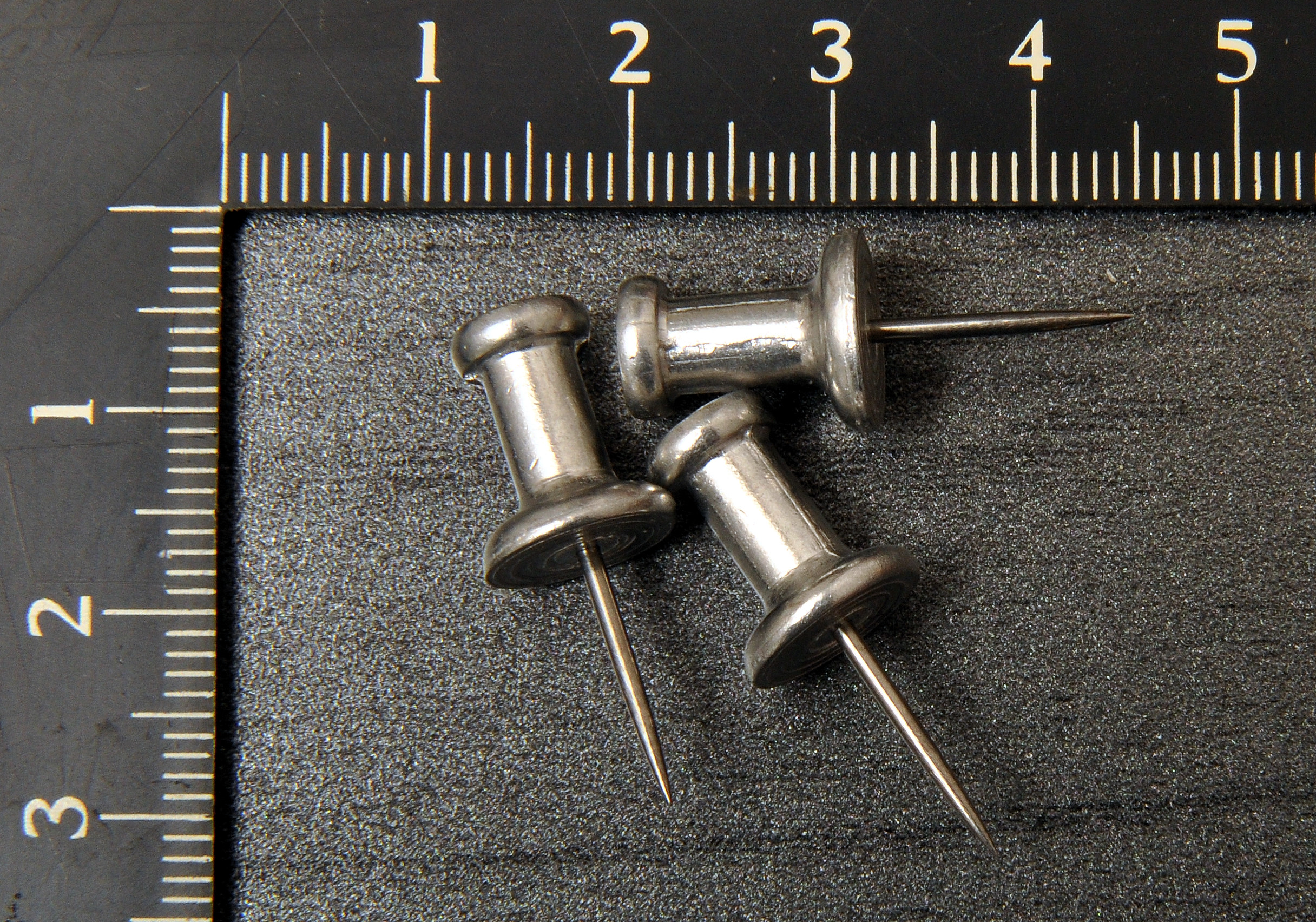 Pushpin (Stoßnadel) für Pinnwand und Reißbrett mit Metall-Griff